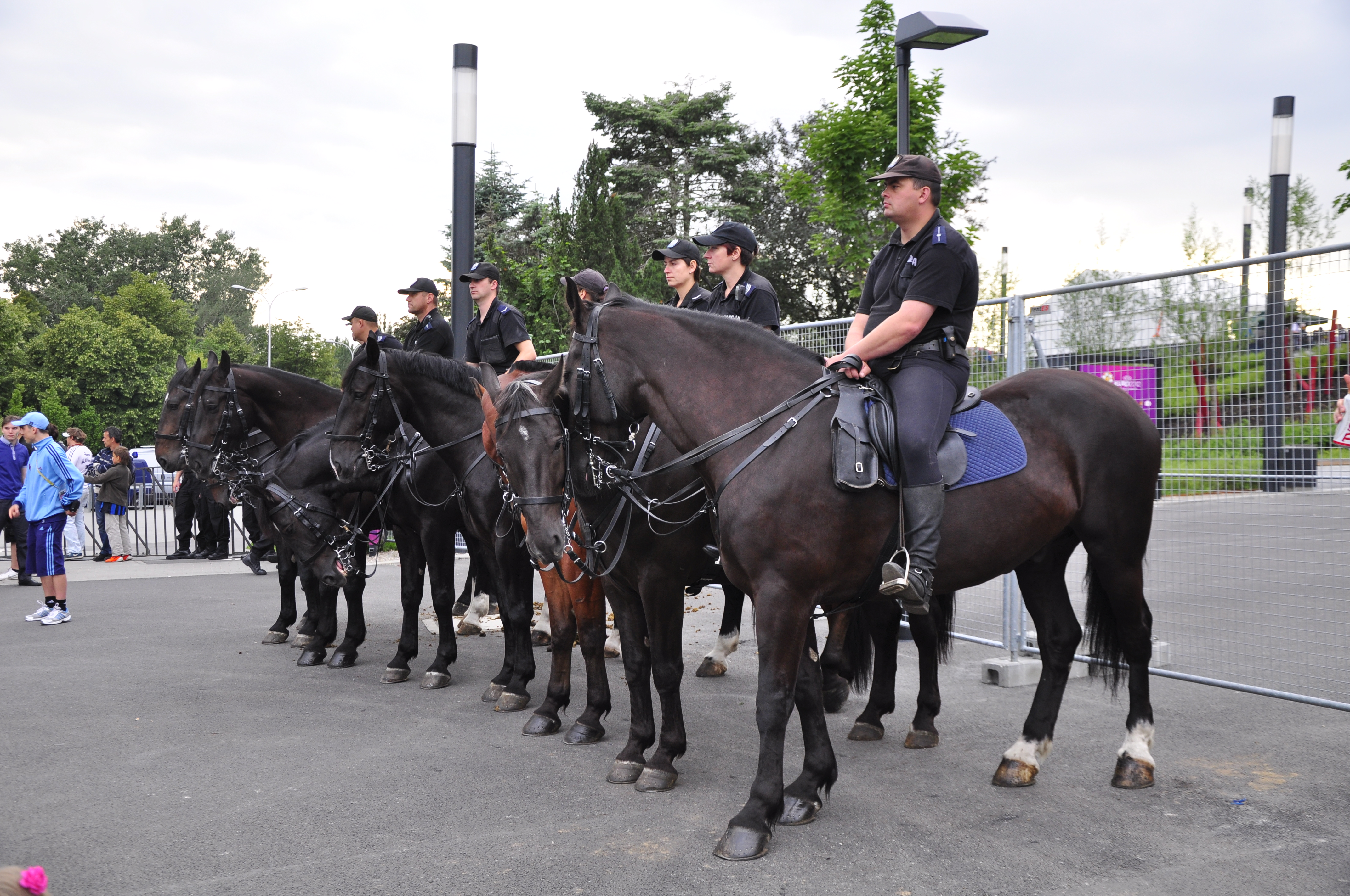 Deutschland-Italien, Euro 2012